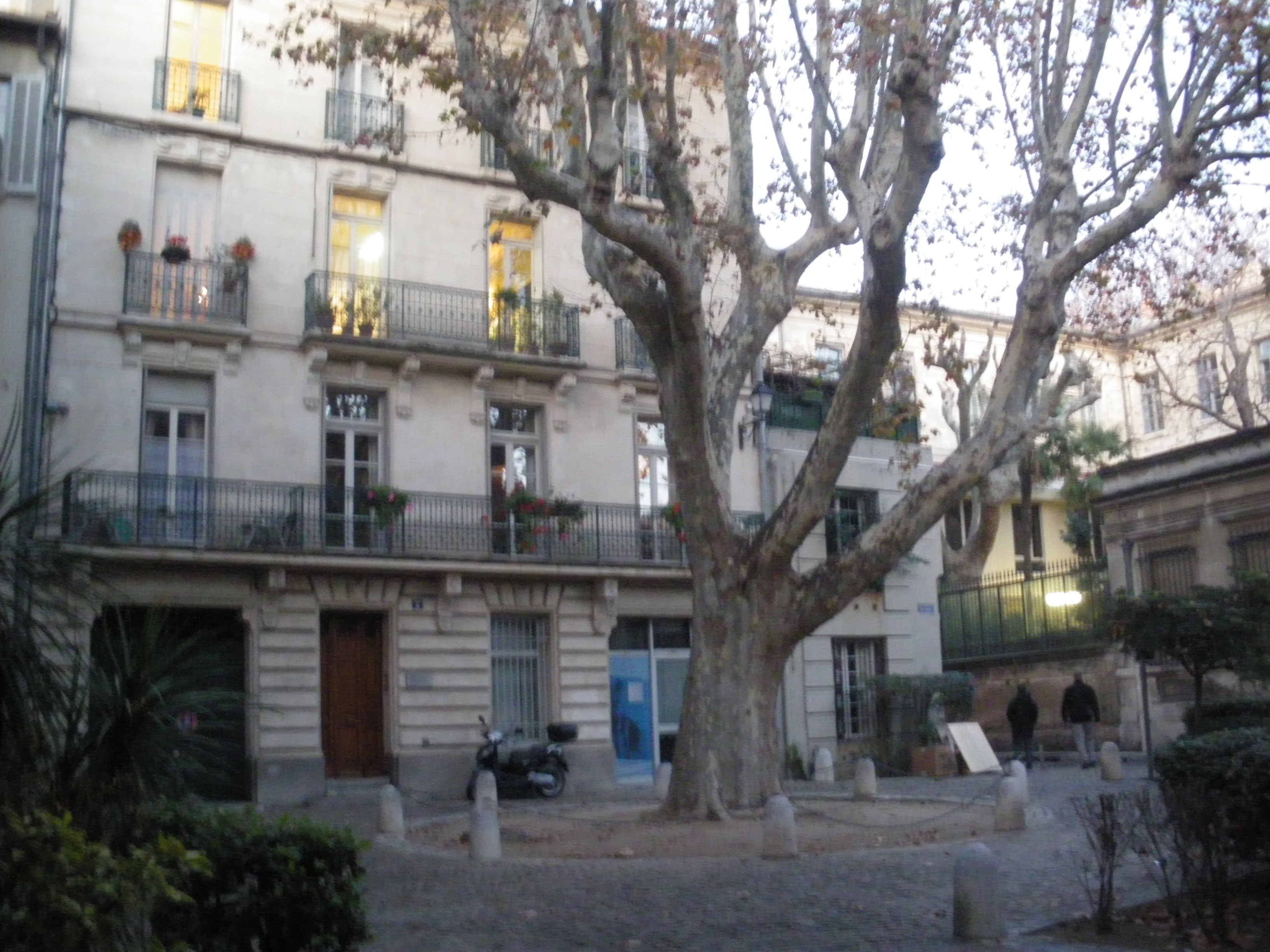 Place du Plan de Lunel à Avignon